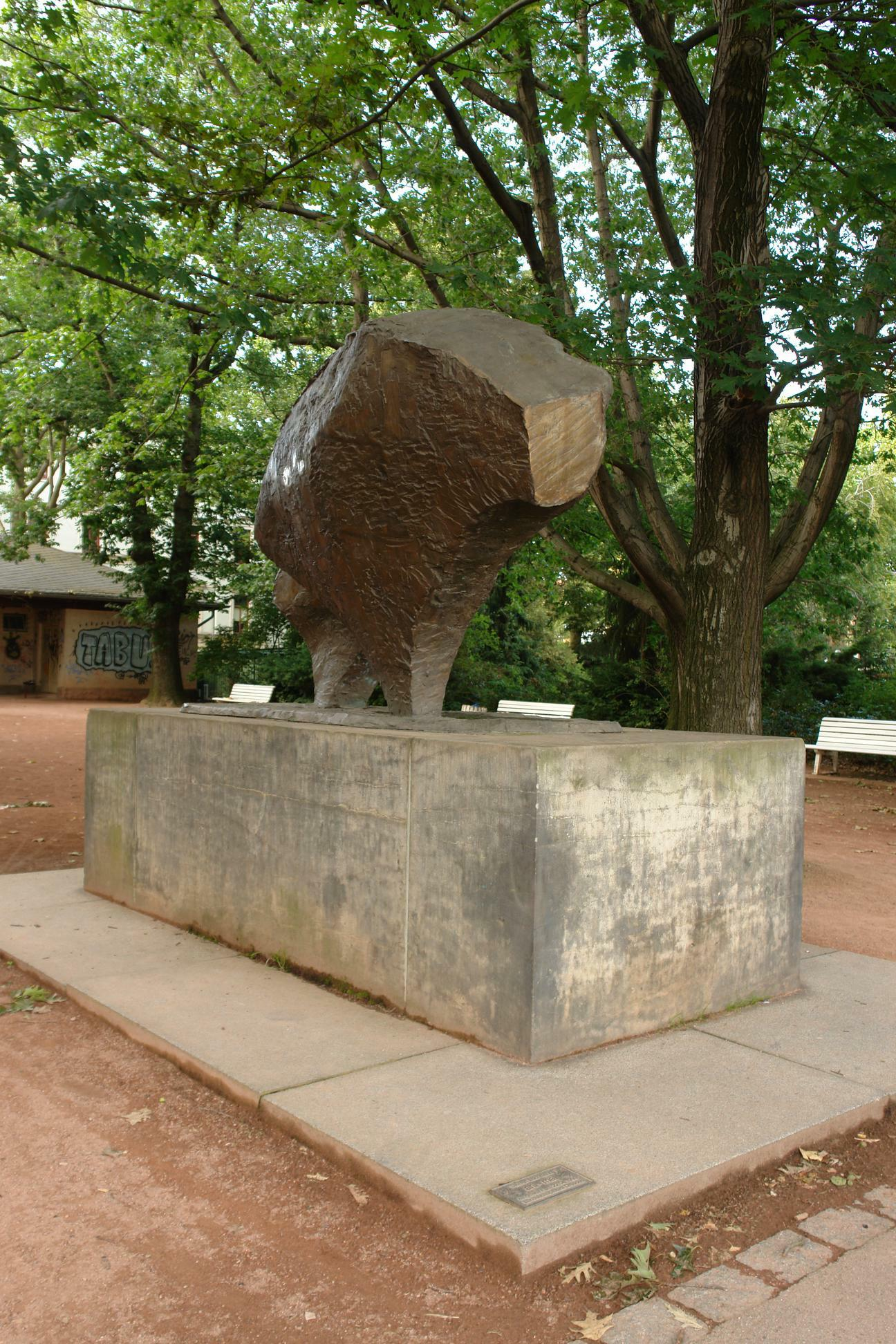 "Ani-mal" Plastik.